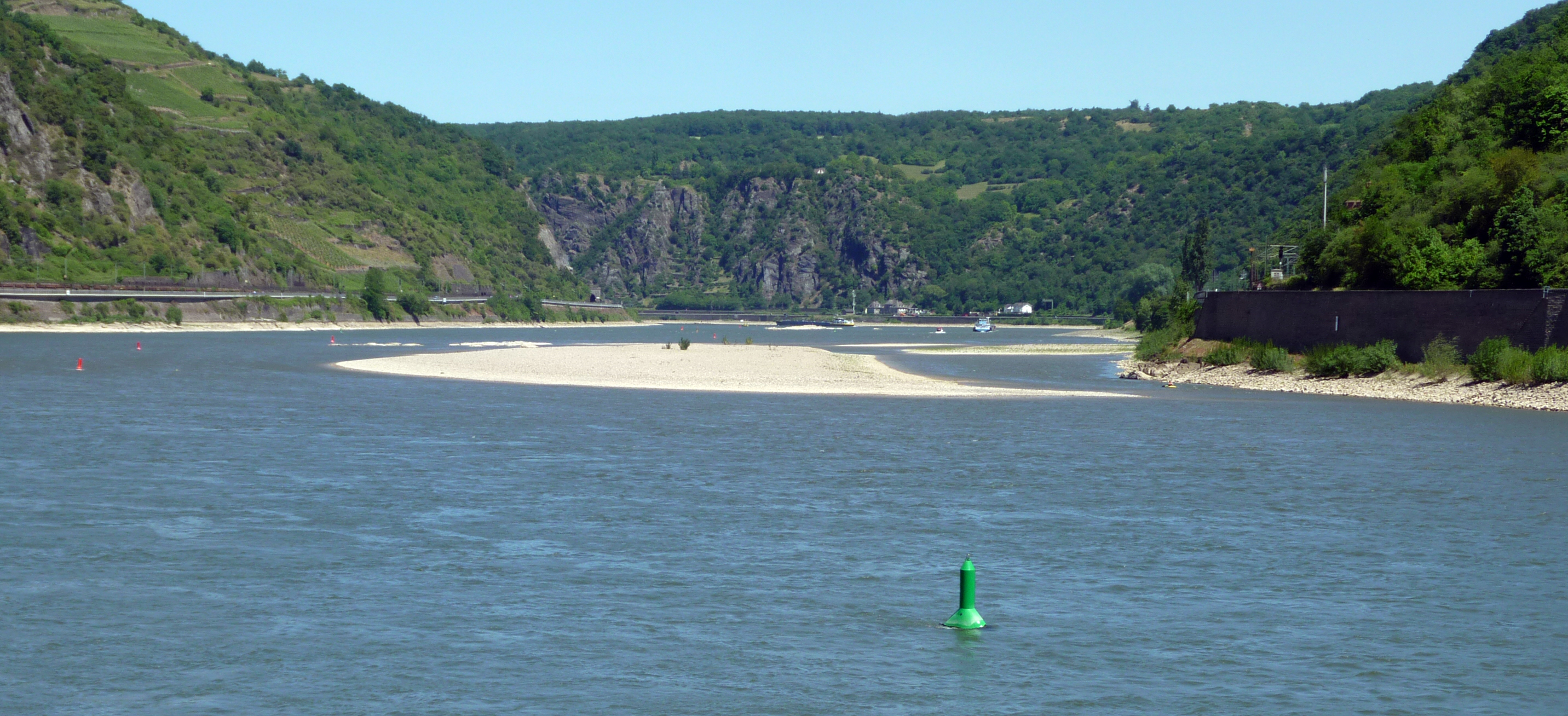 Jungferngund und Geisenrücken von Oberwesel aus gesehen